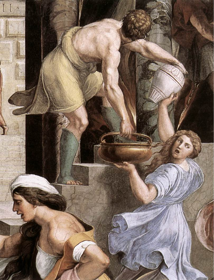 detail